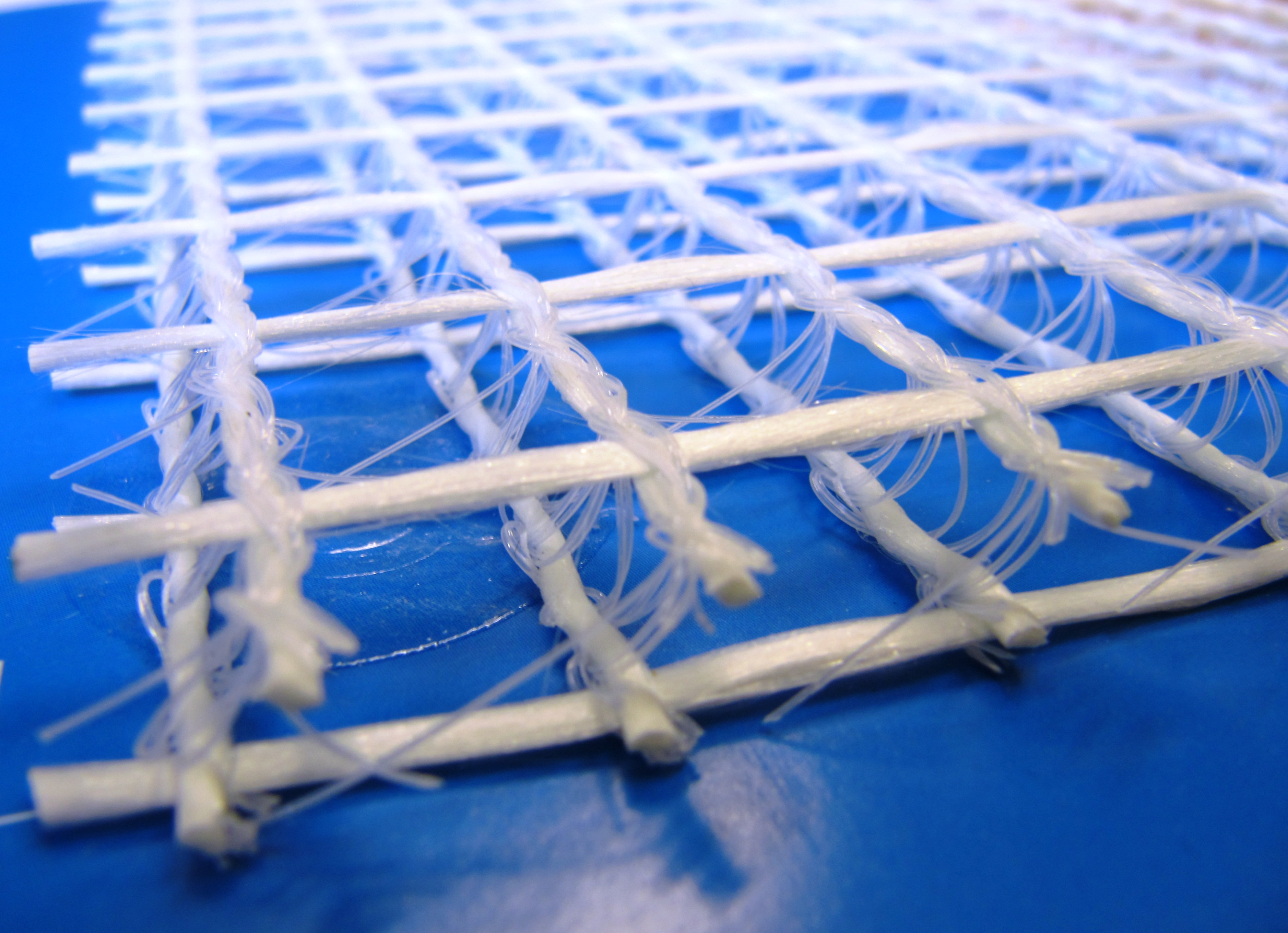 Glasfaser-3D-Bewehrung für Textilbeton aus Glasfasern